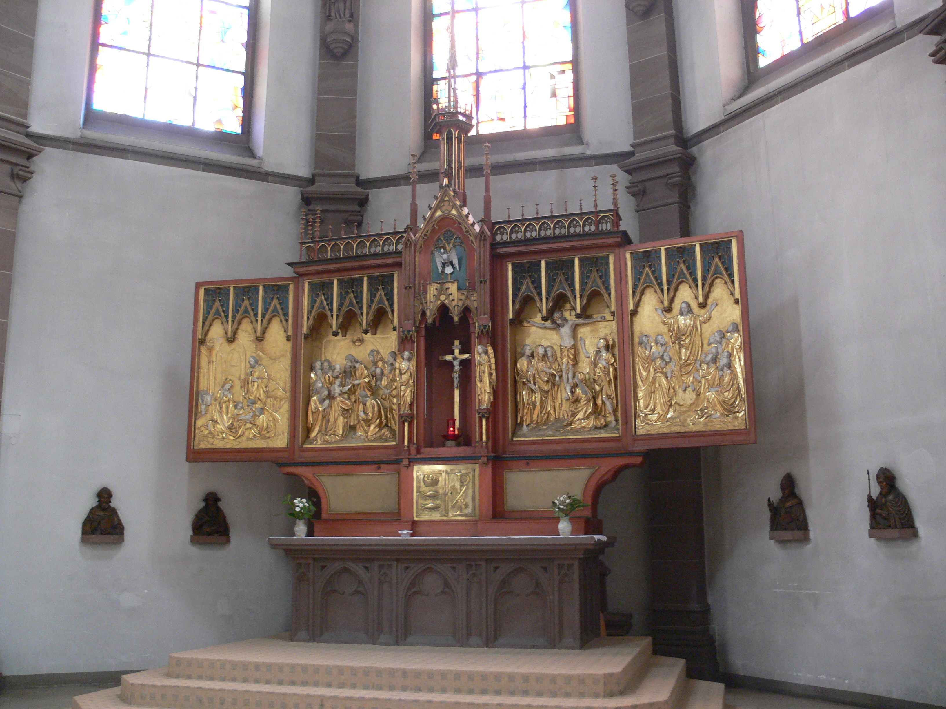 Heilig-Geist-Kirche (Kath. Pfarrkirche Hl. Geist), Schwetzingerstadt, Mannheim Hochaltar von Thomas Buscher